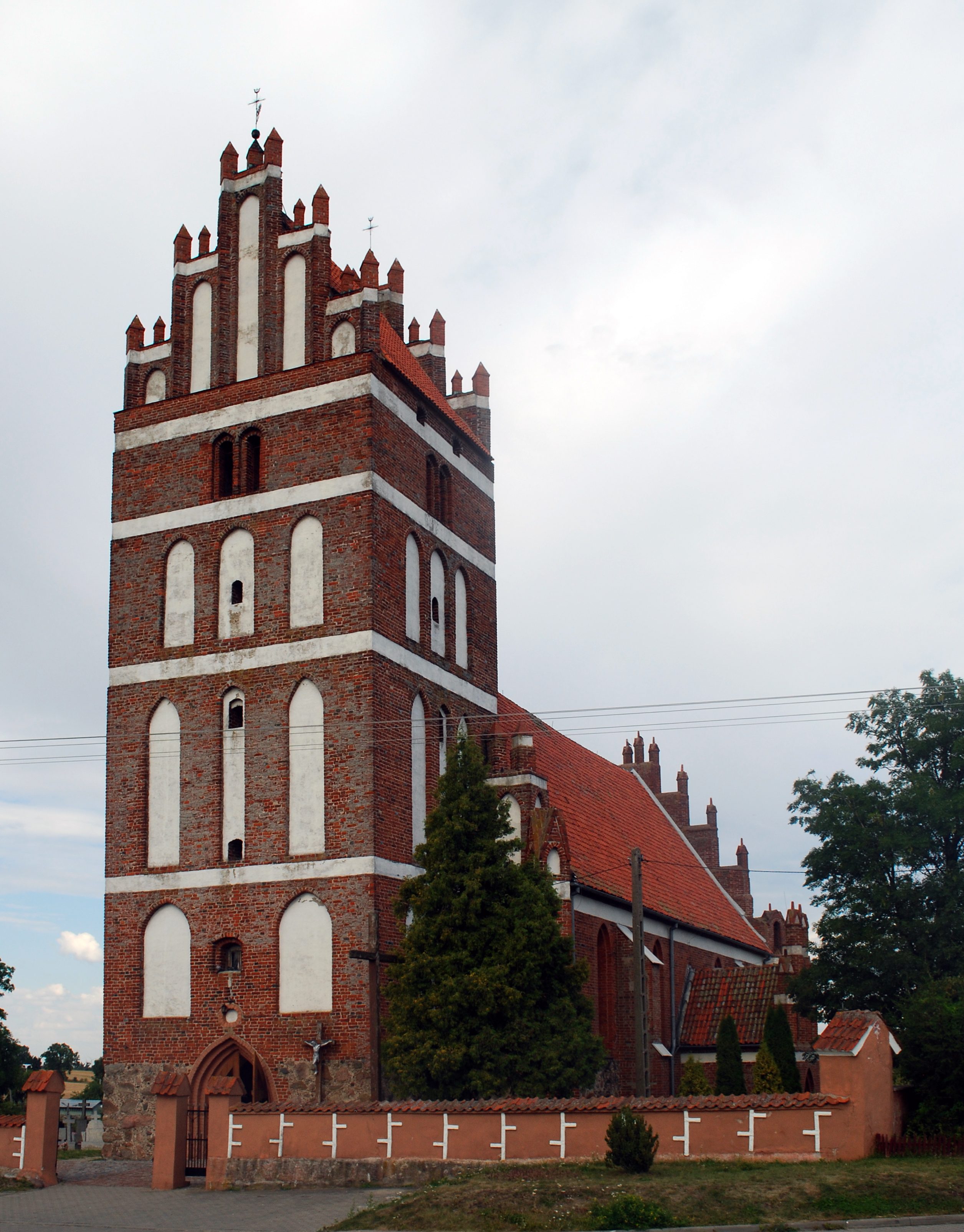 Sątopy - Kościół pw. Św. Judy, (zabytek nr rejestr. A-2809) - widok od frontu